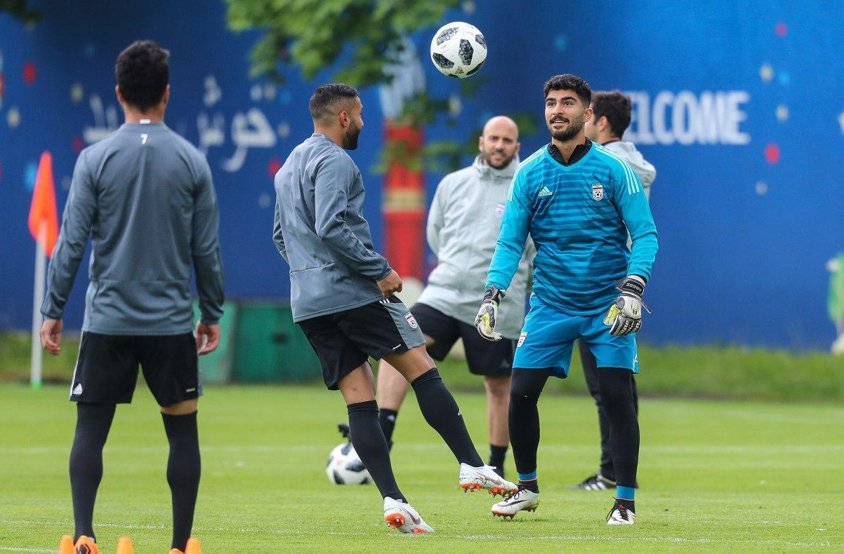 بازیکنان تیم فوتبال ایران در حال تمرین